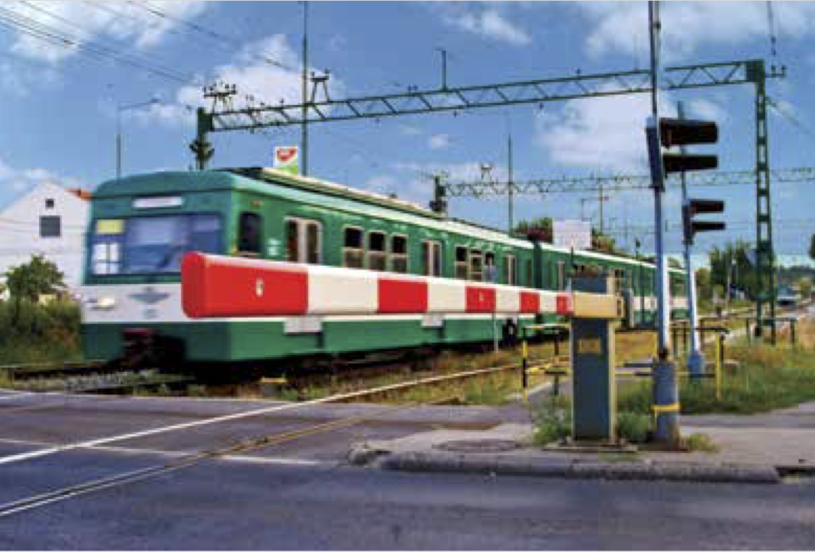 HSH-03 sormpó Cinkotán